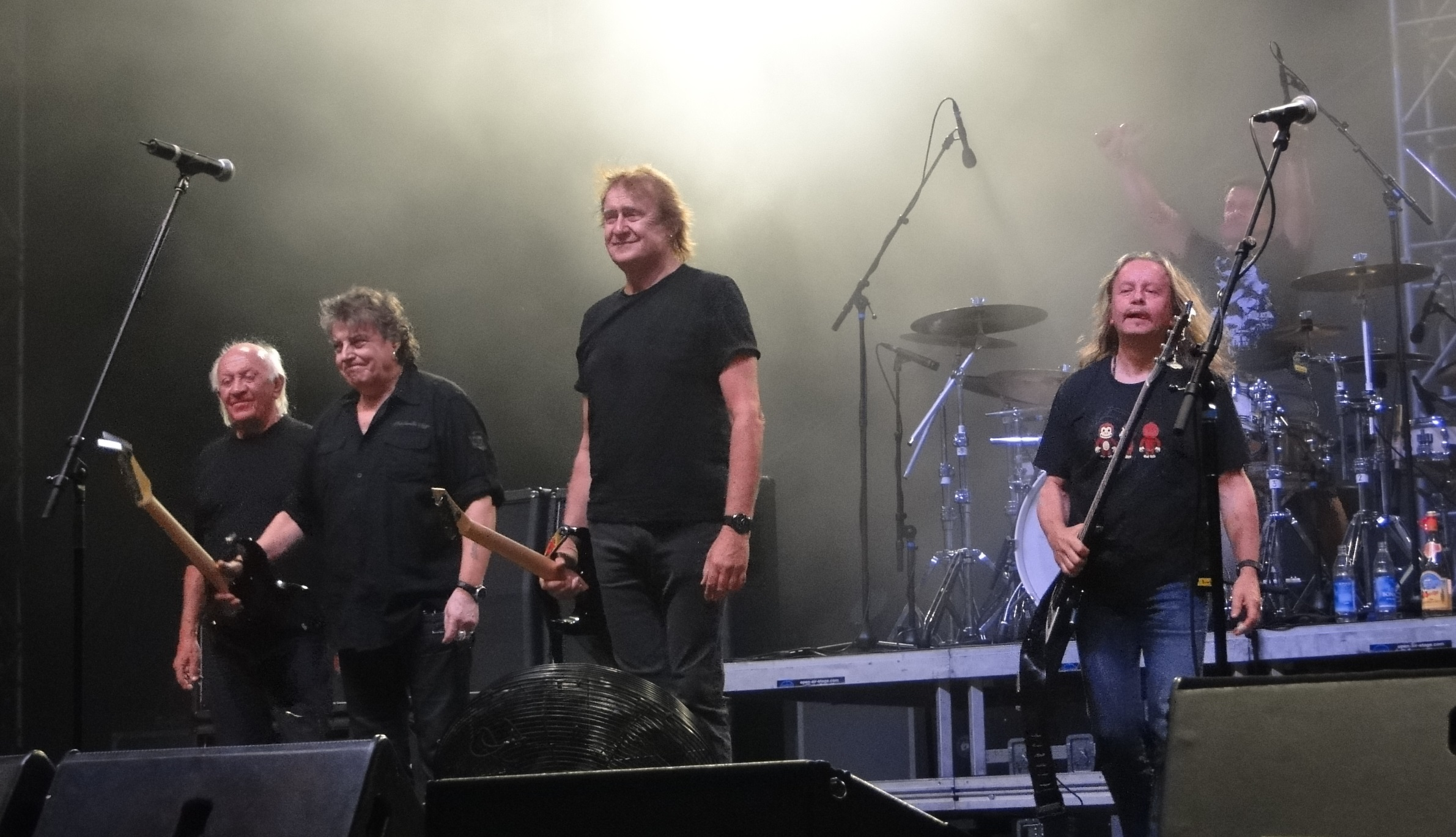 Die Puhdys 2013 bei einem Auftritt in Dresden